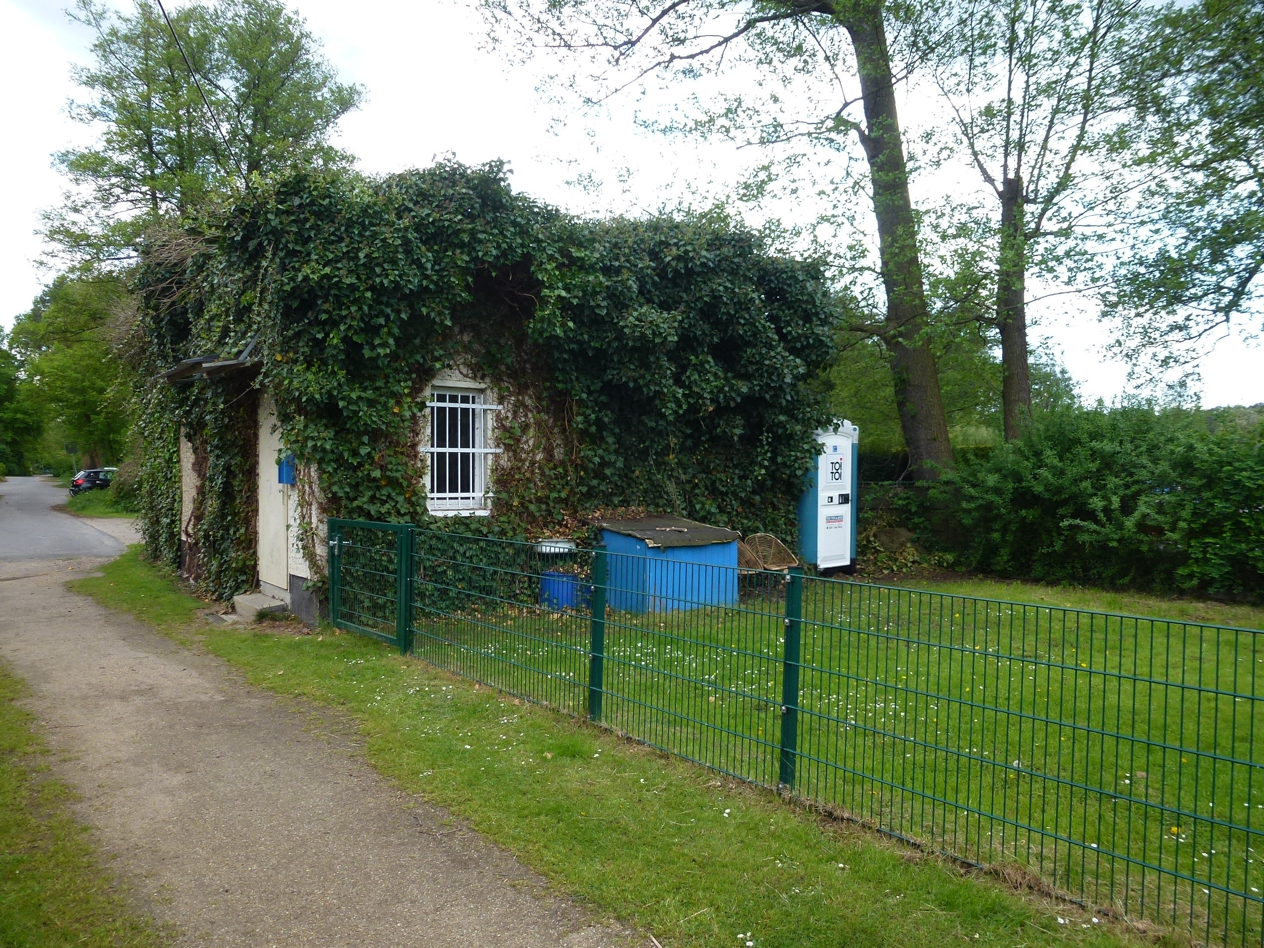 Berlin-Müggelheim Zur Fähre Fährmanannshaus